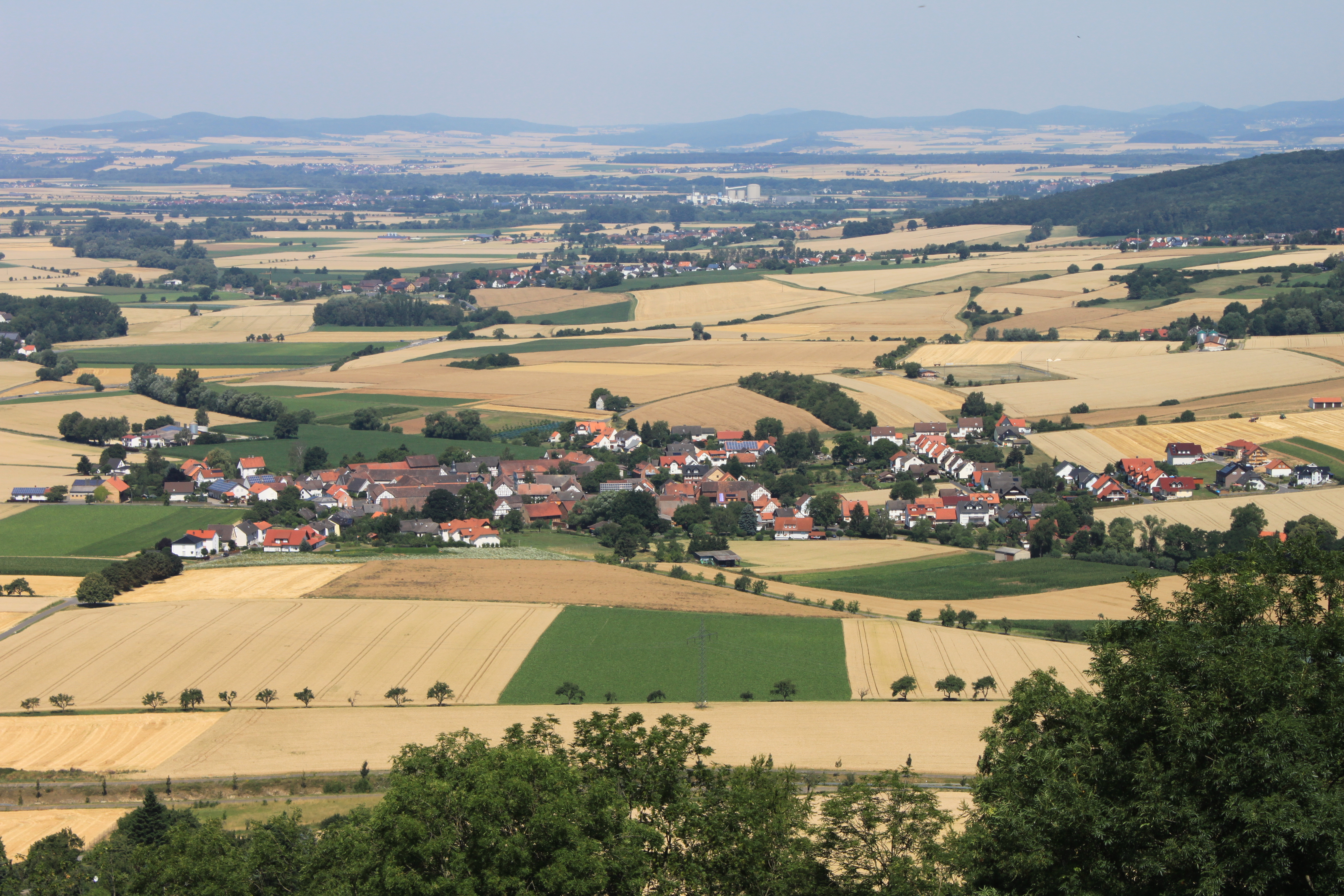 Stadtteil Mardorf von Homberg (Efze); in der Bildmitte oben die Zuckerfabrik in Wabern.